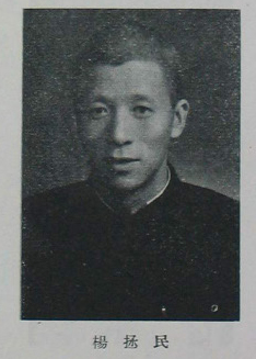 中文（台灣）: 中國人民政治協商會議第一屆全體會議代表